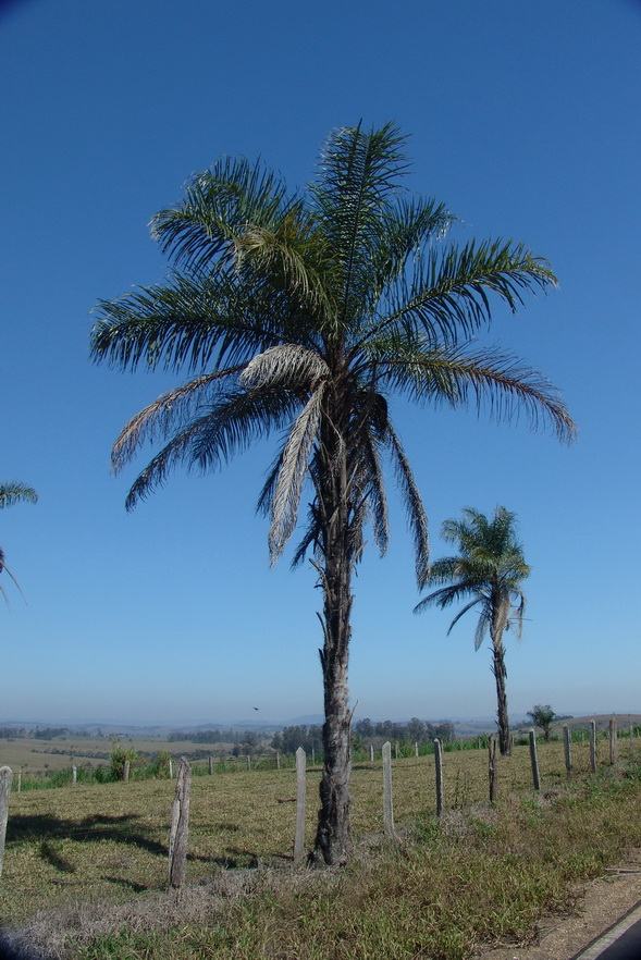 Macauba. Acrocomia aculeata.